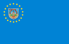 Прапор Троїцького району